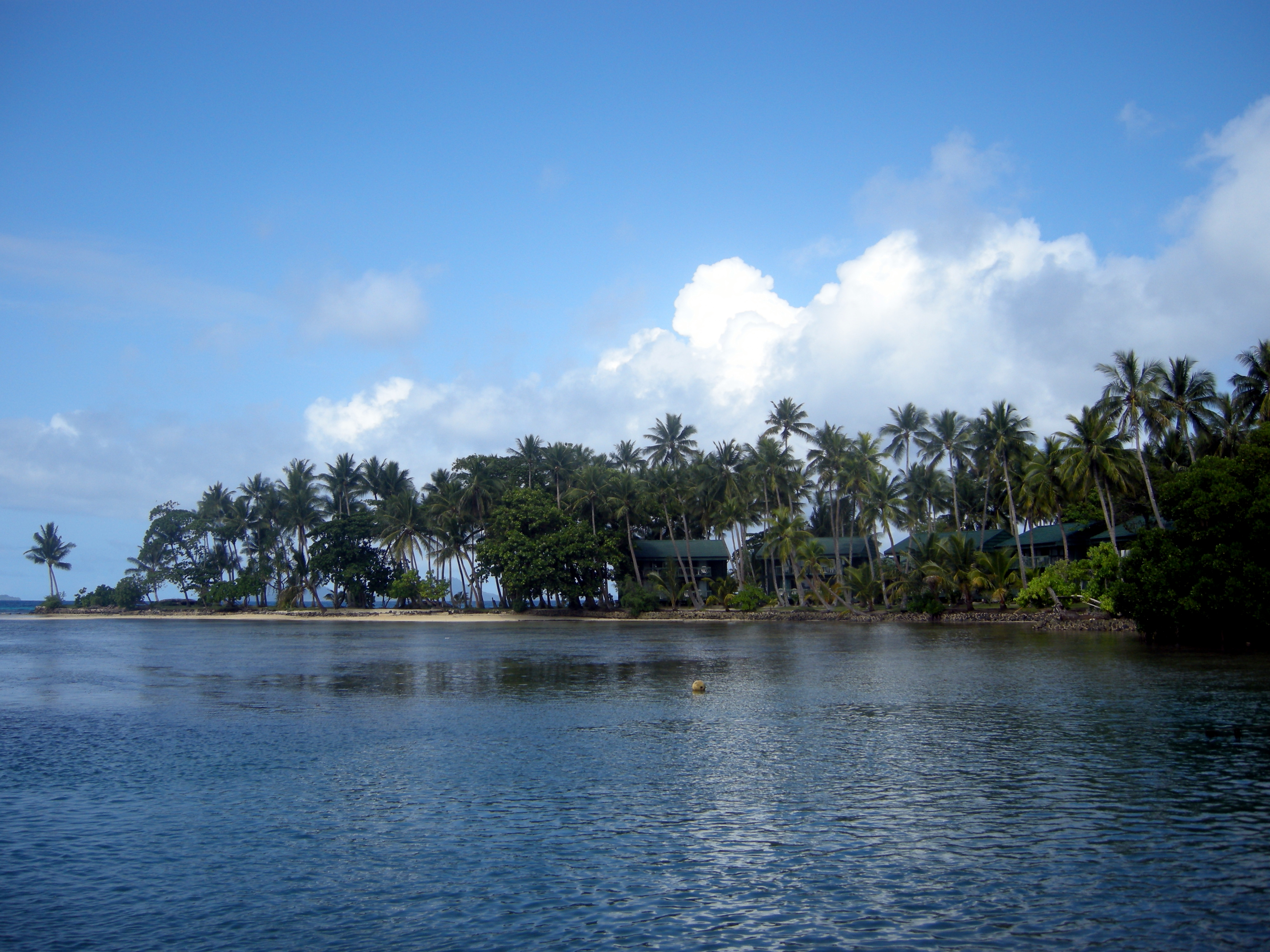 Truk Blue Lagoon Resort.